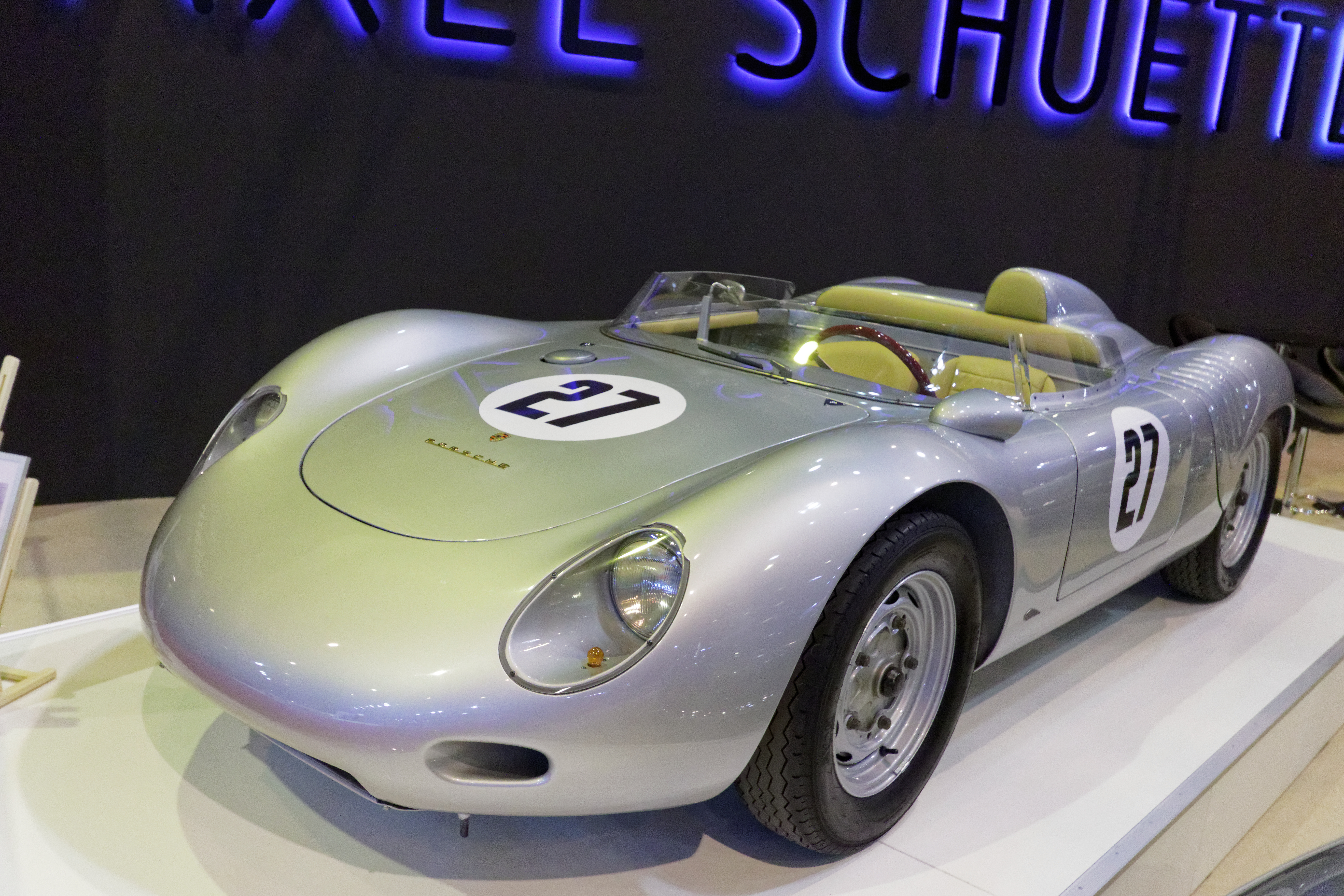 Une des voiture présentée lors du salon Rétromobile de Paris 2015